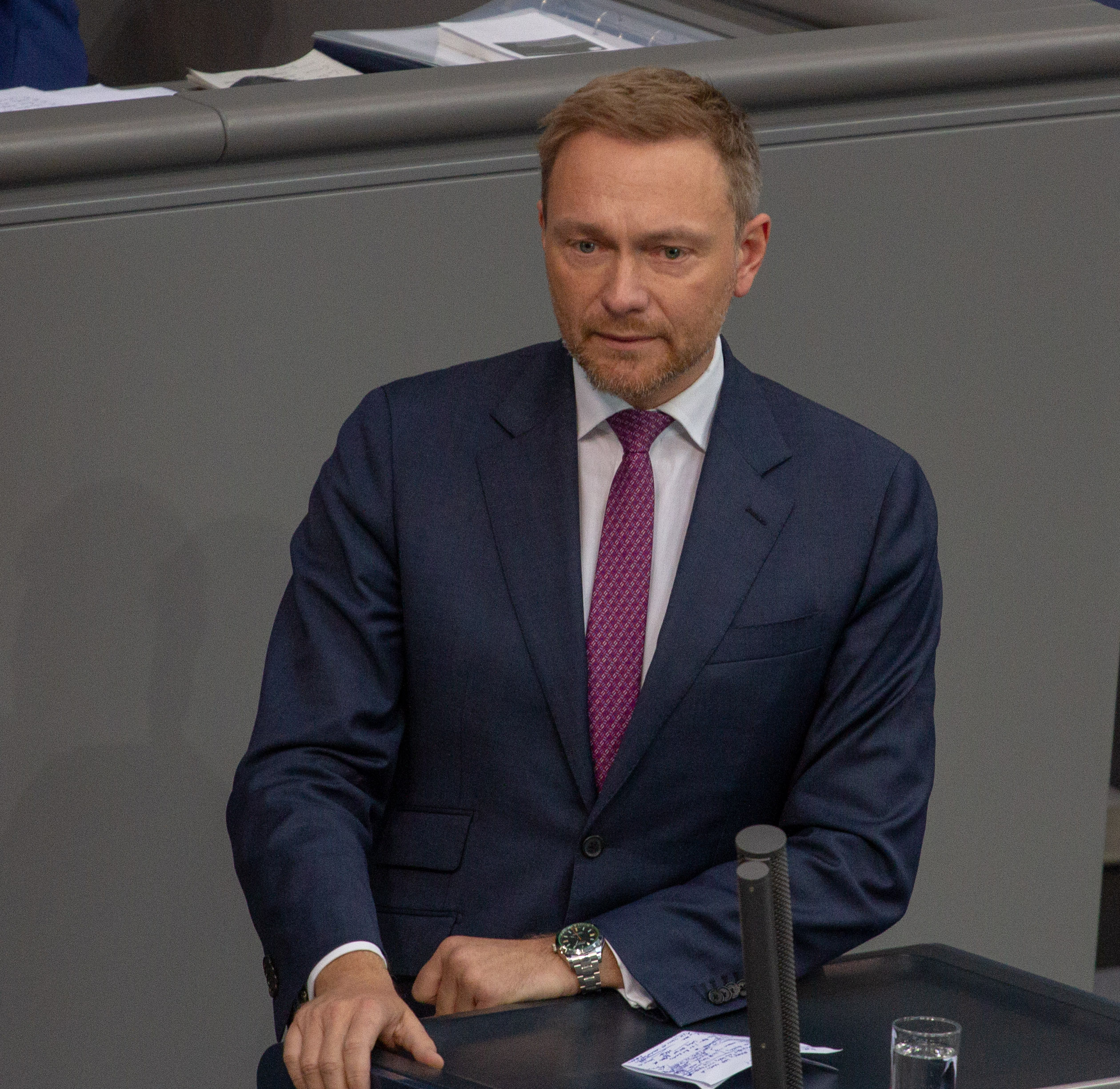 Christian Lindner, Mitglied des Deutschen Bundestages, während einer Plenarsitzung am 11. April 2019 in Berlin.